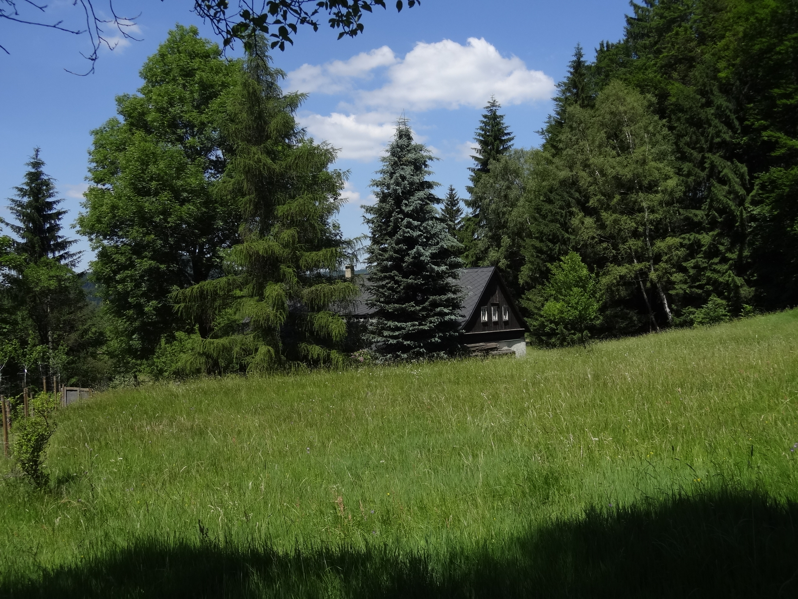 PP Kytlice v okolí chalup čp. 10 a 13 ve Falknově chrání masový výskyt šafránu jarního na pravidelně kosených přirozených vlhkých loukách.